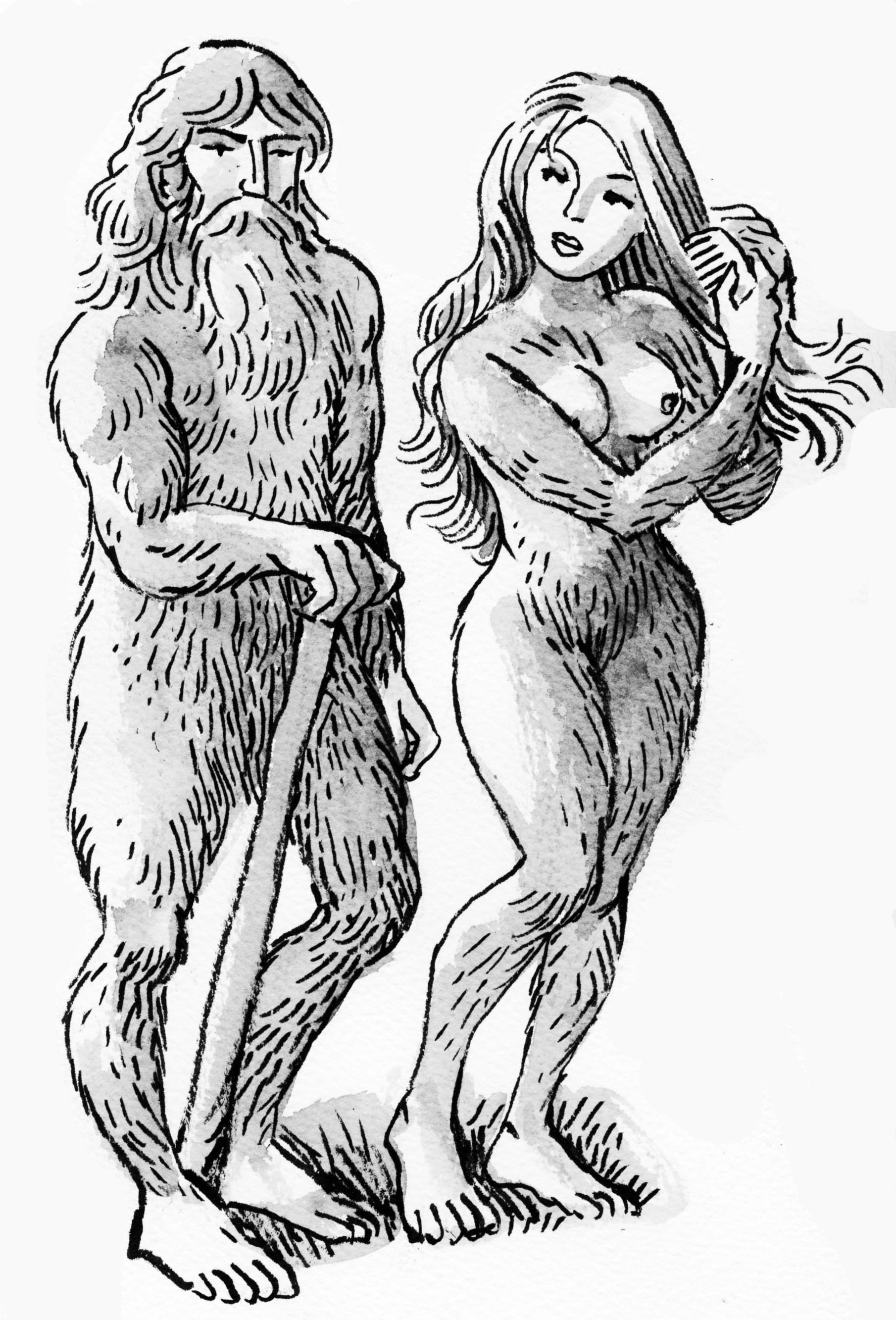 Basajaun et Basaandere, créatures mythiques du Pays basque